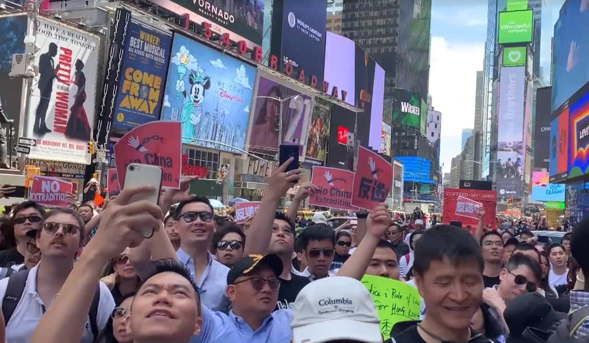 纽约千人集会游行反“送中”